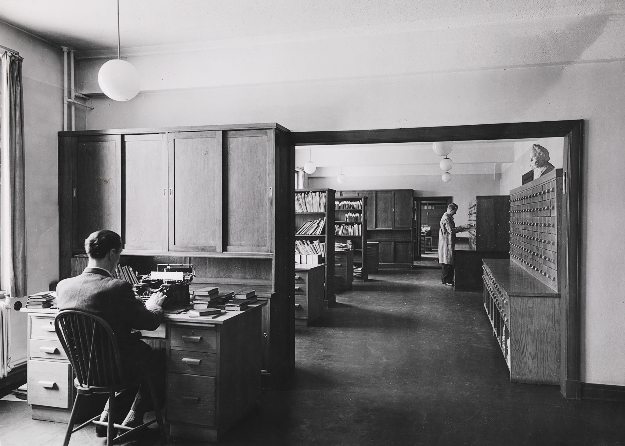 Tittel / Title: Norske avdeling i 3. etasje ved Nasjonalbiblioteket Beskrivelse / Description: Dengang Universitetsbiblioteket. Dato / Date: mars 1946 Fotograf / Photographer: O. Væring Sted / Place: Oslo, Henrik Ibsens gate 110, Nasjonalbiblioteket, Eier / Owner Institution: Nasjonalbiblioteket / National Library of Norway Lenke / Link: Bildesignatur / Image Number: blds_02795